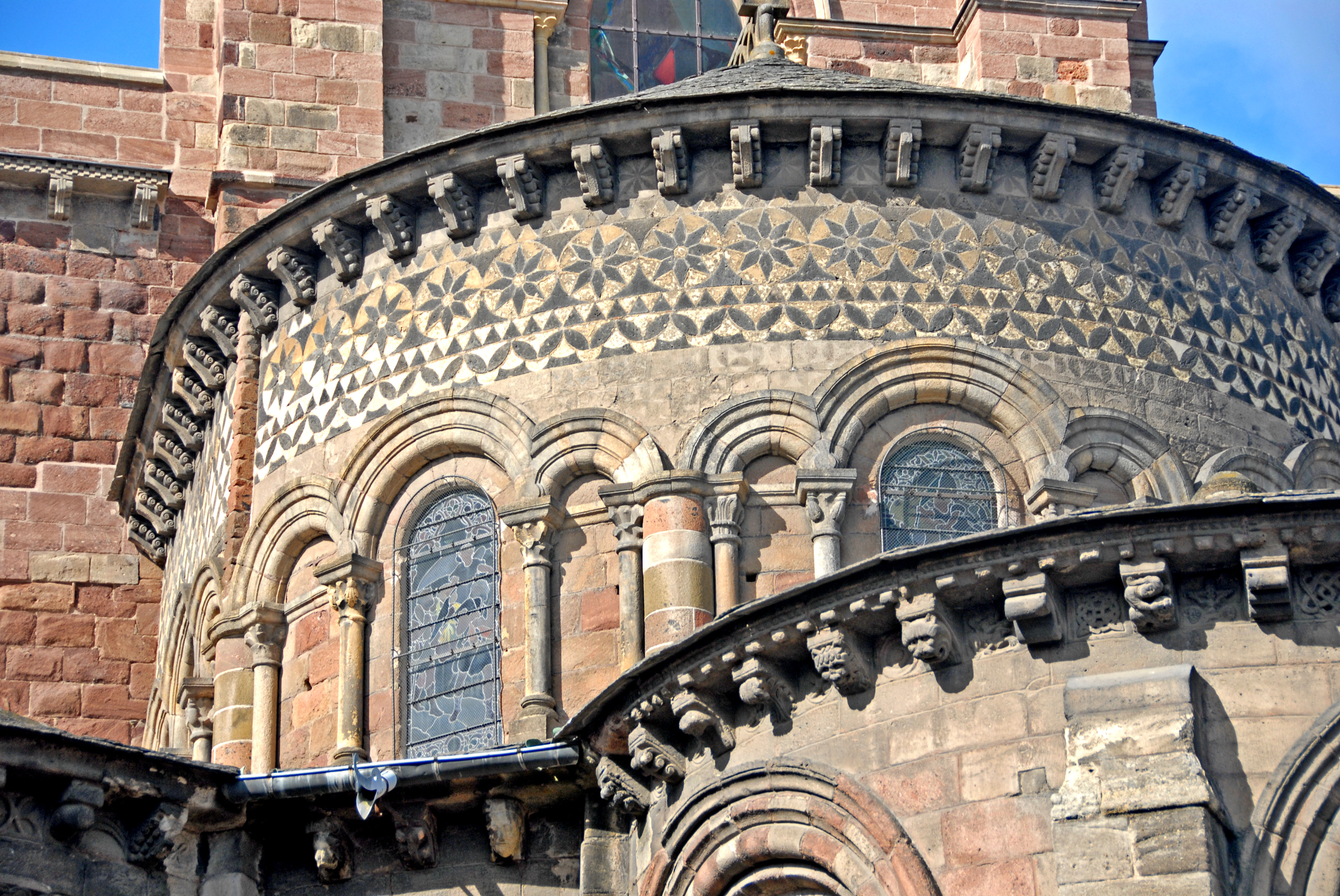 St.-Julien Brioude, Chor von O